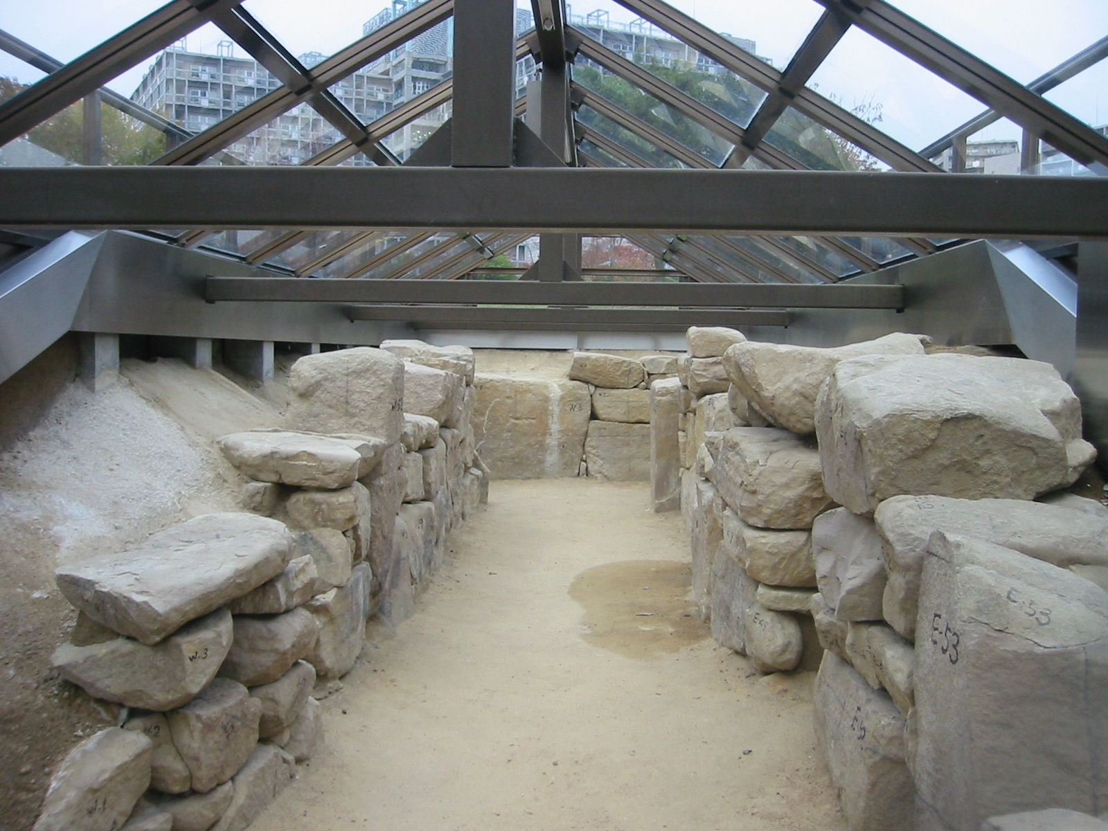 西神中央公園にある高塚山1号墳石室 神戸市埋蔵文化財センター近く